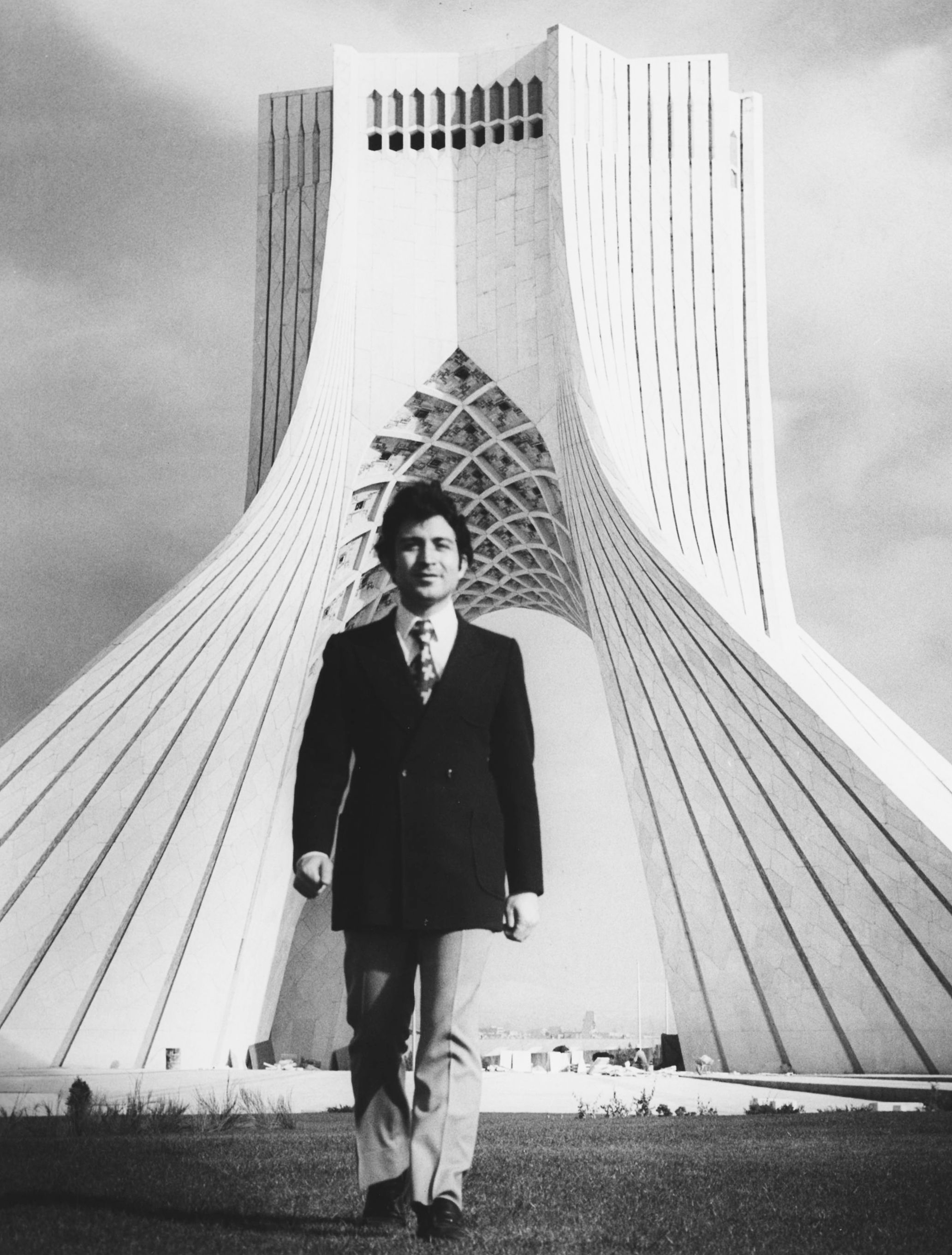 حسین امانت، معمار برج آزادی (شهیاد) تهران در دهه 1350 خورشیدی